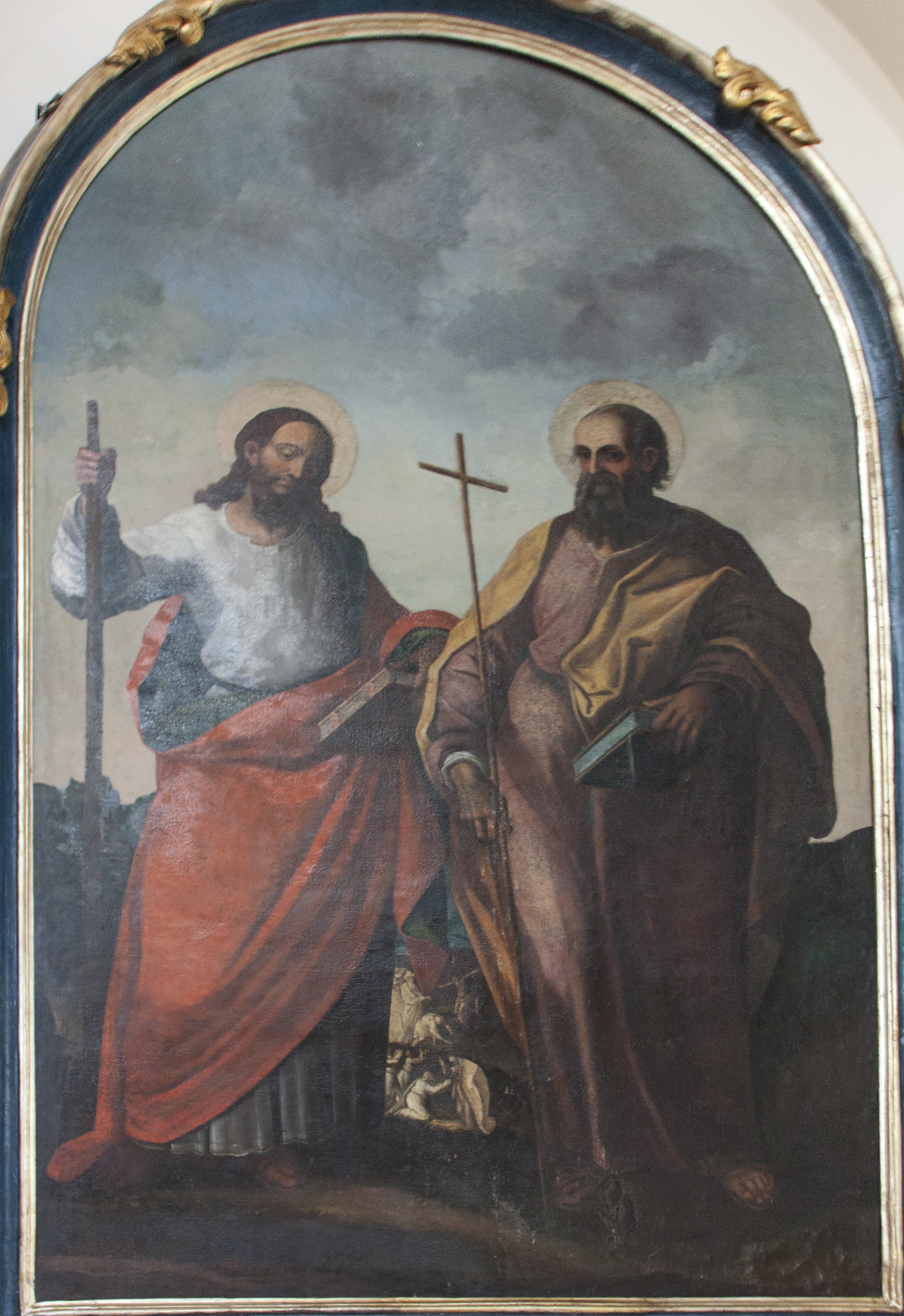 Santi Filippo e Giacomo - Gianforti Lamanna 1628 (180x295 cm)